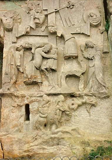 Detmold Externsteine ReliefThis is a photograph of an architectural monument., no. 0